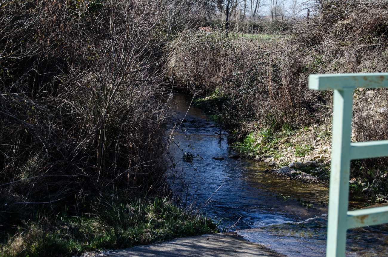 Rioparaíso. Río Moralejos.